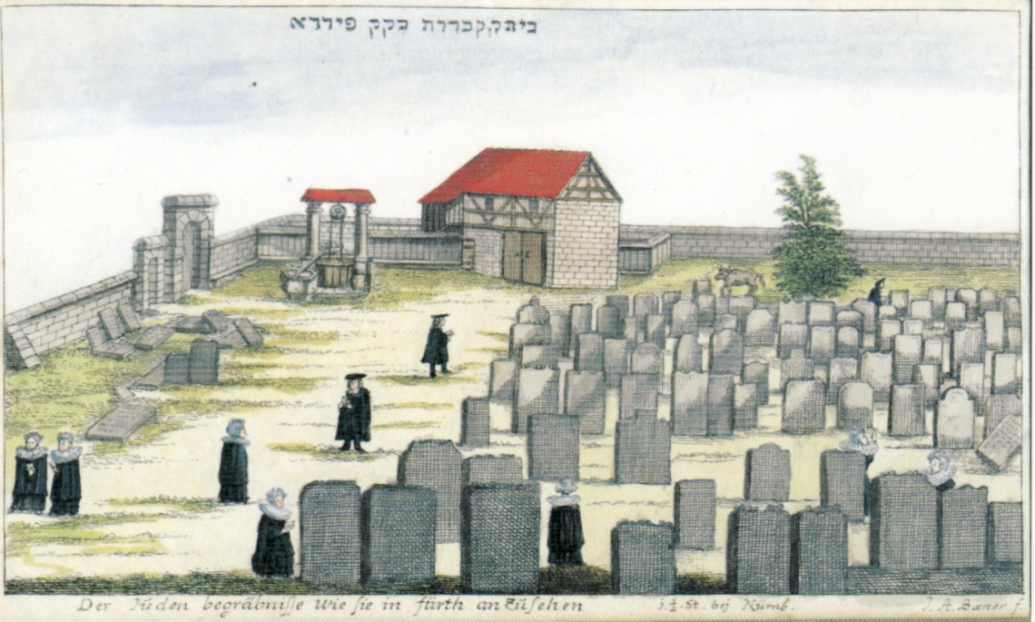 Alter Jüdischer Friedhof in Fürth, kolorierter Kupferstich von 1705. Orginalbeschriftung: "Friedhof (wörtlich: Haus der Gräber) in der heiligen Gemeinde (abgekürzt) Firda" (hebräisch: בית הקברות בקהילה קדושה פירדא); „Der Juden begräbnisse wie sie in Fürth anzusehen 3. 1/2. St. bej Nürnb.“ (Stein bei Nürnberg)